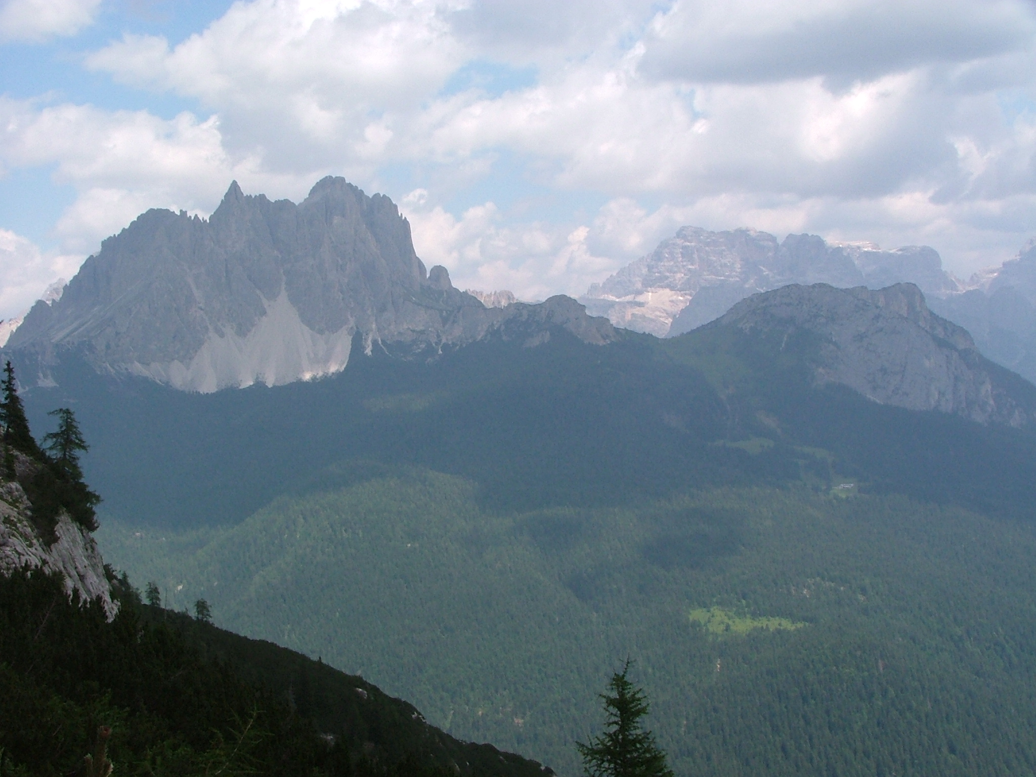 Cadini di Misurina dal Sorapiss